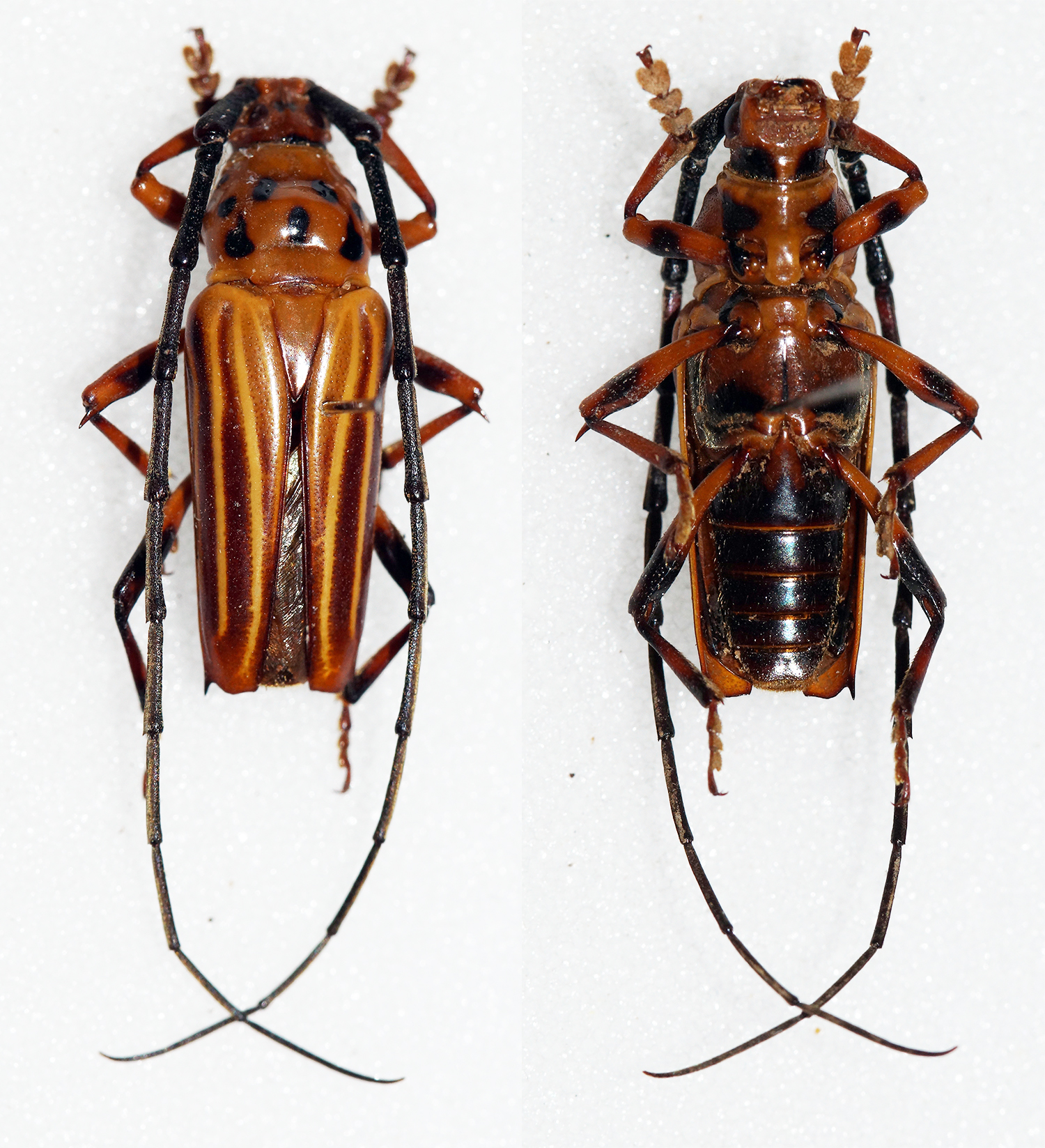 Hüdepohl,1979 Sex: Male Data: 02-09-11 - Zanja Moroti - Concepcion - Paraguay Size: ?